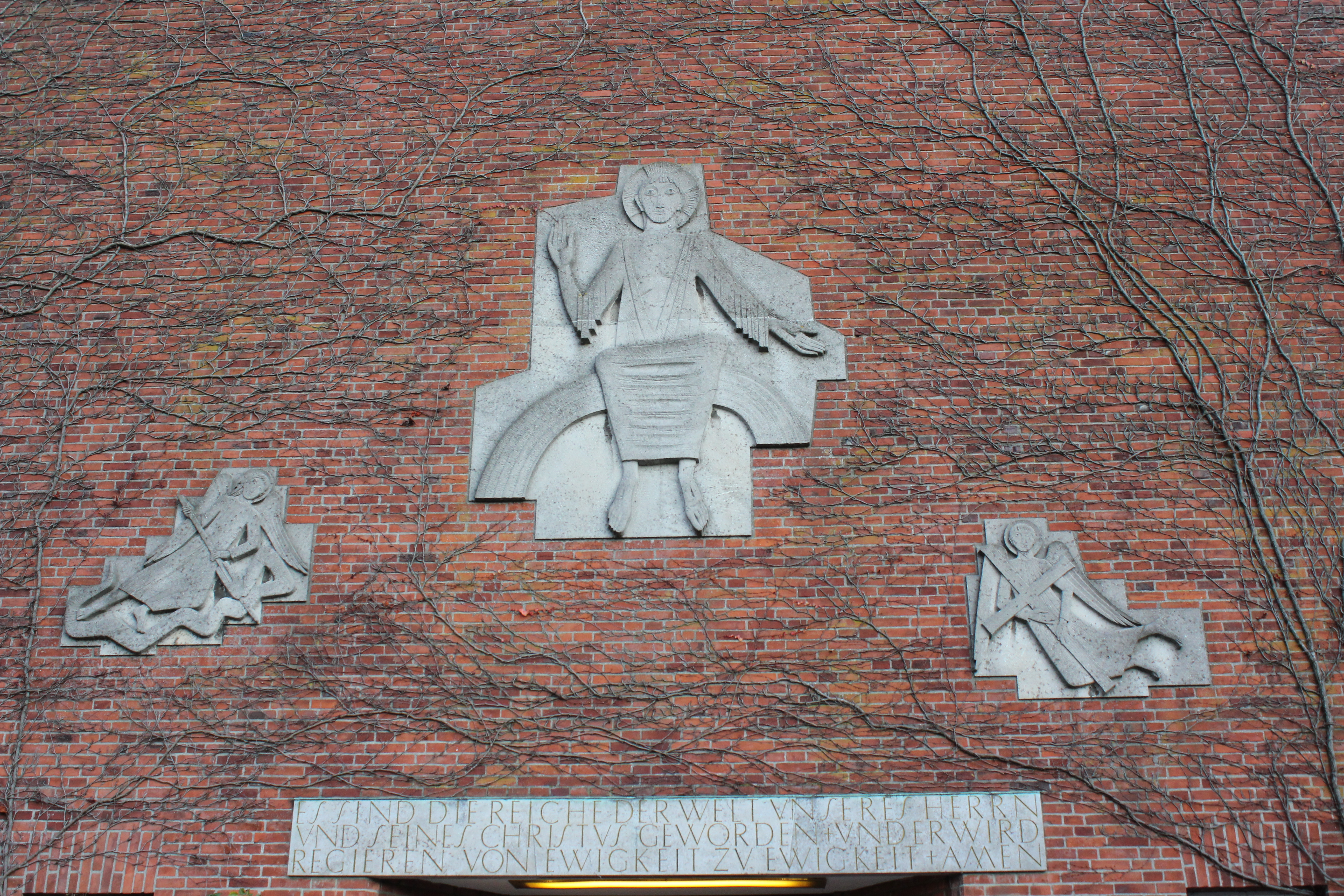 Christuskirche (Portalgestaltung) -- Schriftzug: "Es sind die Reiche der Welt unseres Herrn und seines Christus geworden † und er wird regieren von Ewigkeit zu Ewigkeit † Amen." (Offb 11,15 gemäß Lutherbbel)